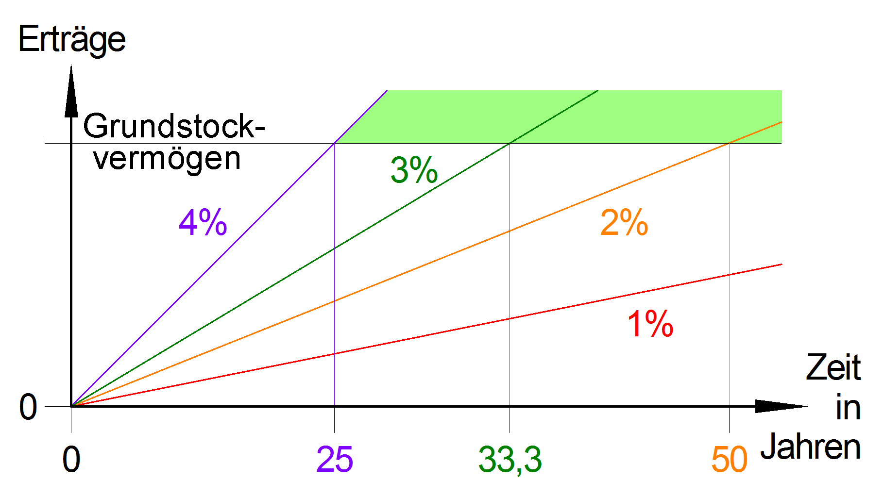 Zeitlicher Verlauf der Erträge aus einer Stiftung bei verschiedenen effektiven Renditen.